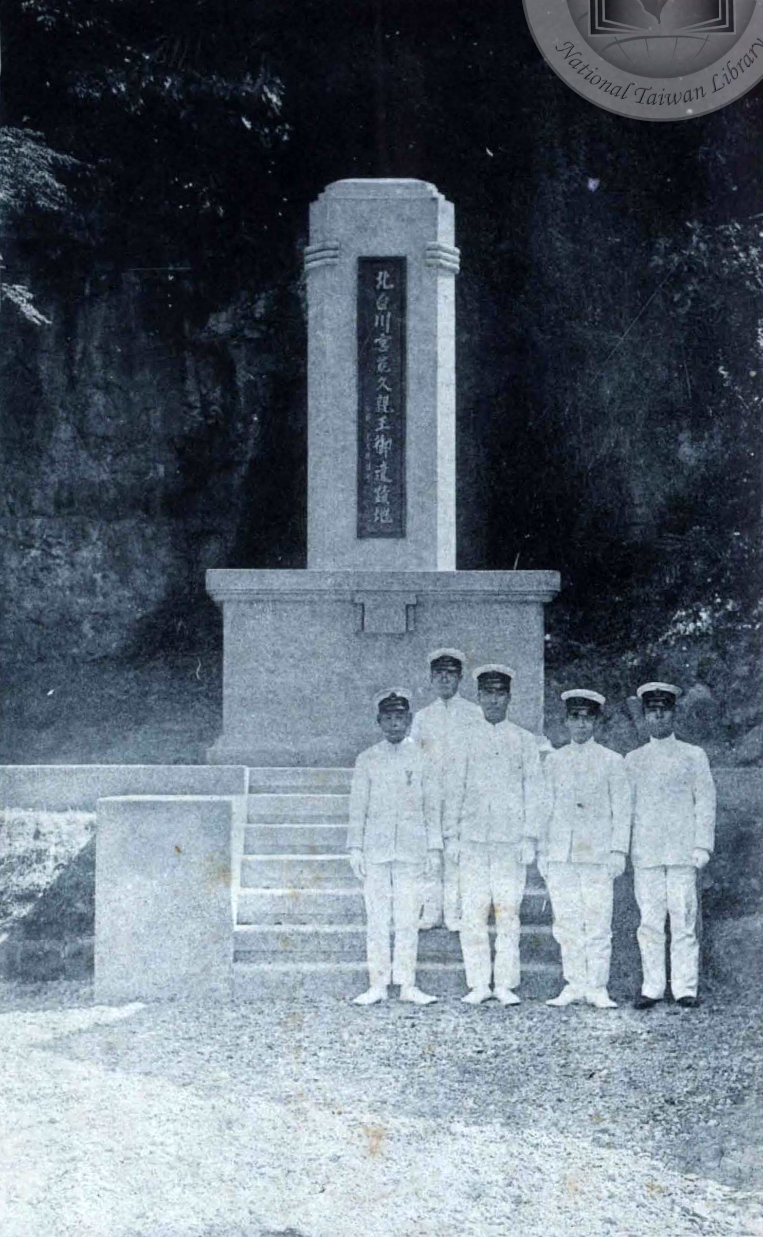 中文（台灣）: 基隆市入船町北白川宮能久親王紀念碑，大日本帝國海軍五人立於碑前。